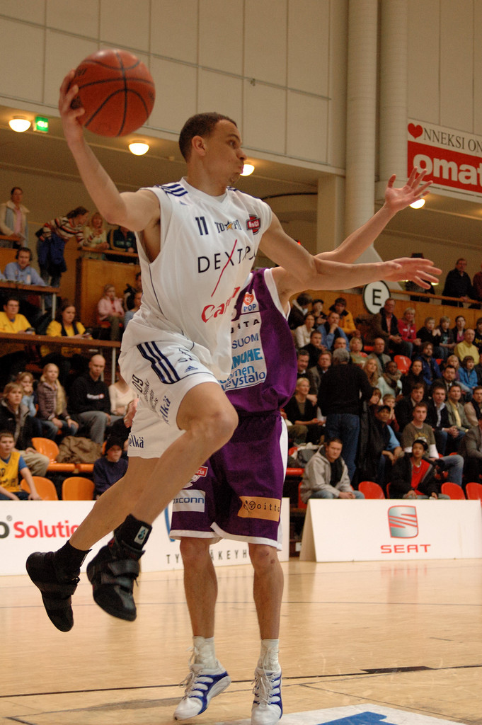 Maurizio Pratesi ottelussa ToPo - Namika Lahti 13.3.2006 Töölön Kisahallissa, Helsingissä. Kuvaaja: Tuomas Venhola